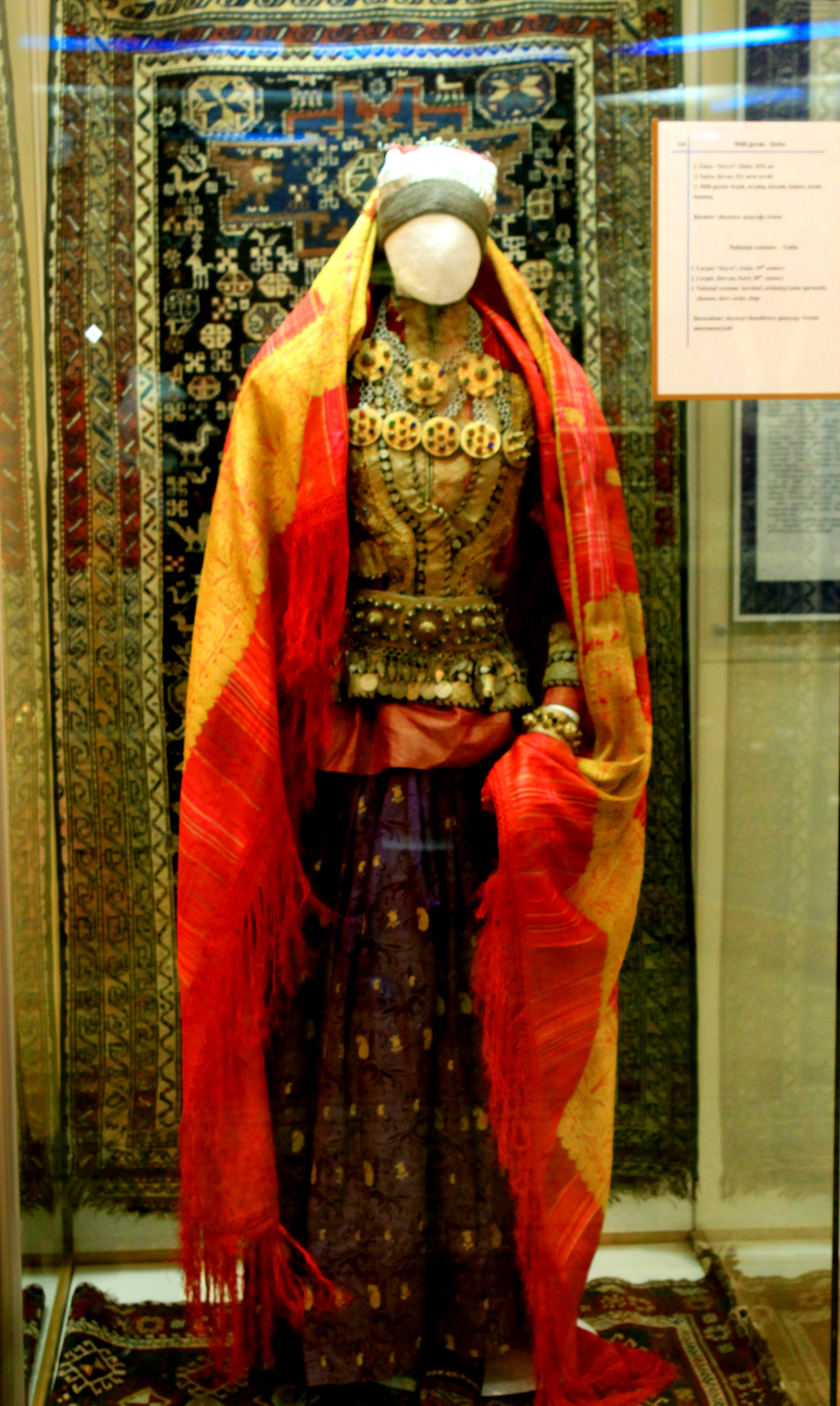 Quba xanlığına aid qadın geyimi